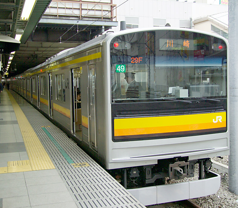 JR East Japan Railway Company Nambu Line Train Tachikawa Tokyo Japan